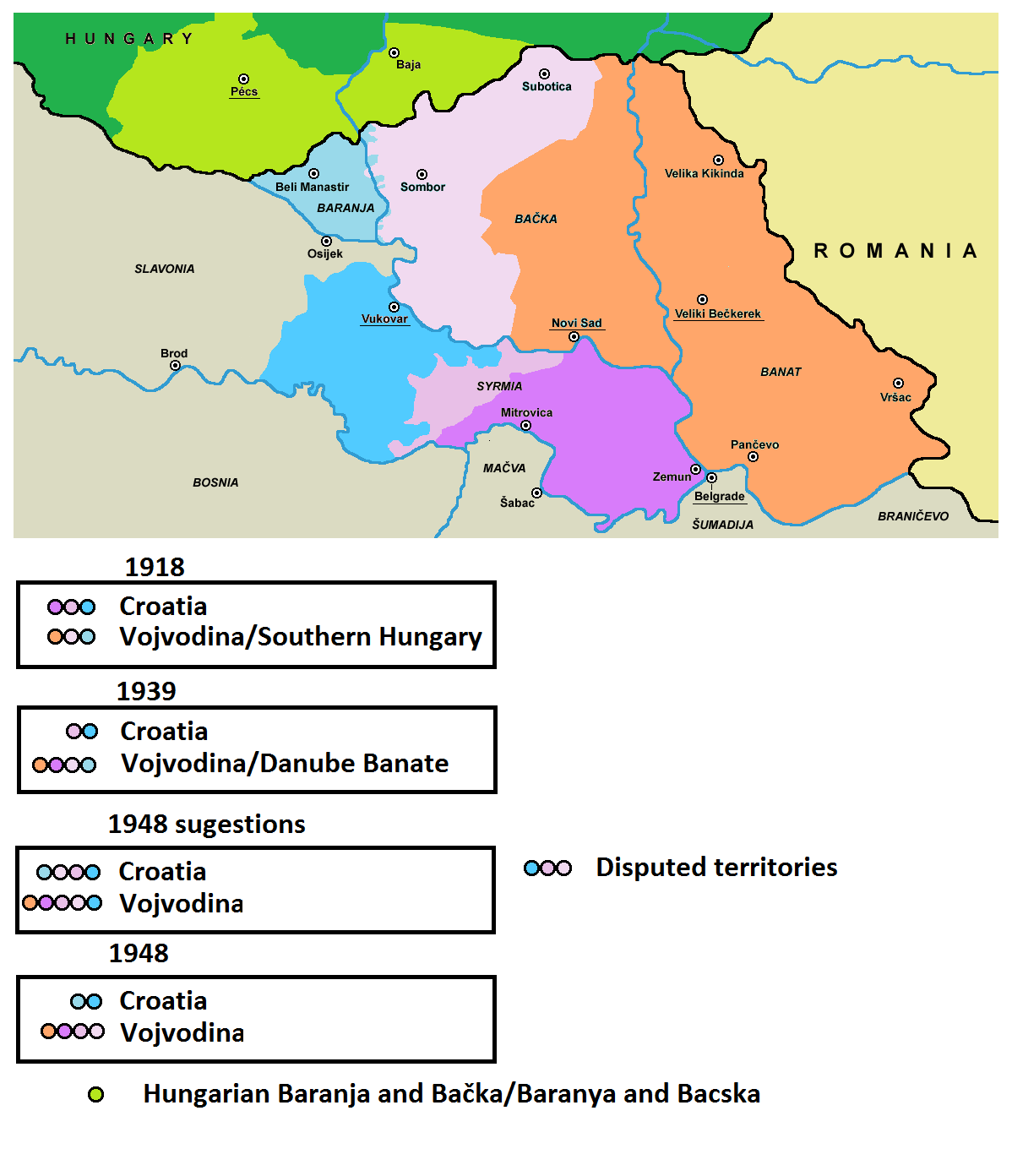 Opis razgraničenja Hrvatske i Srbije/Vojvodine u Podunavlju (Srijemu, Baranji i Bačkoj)